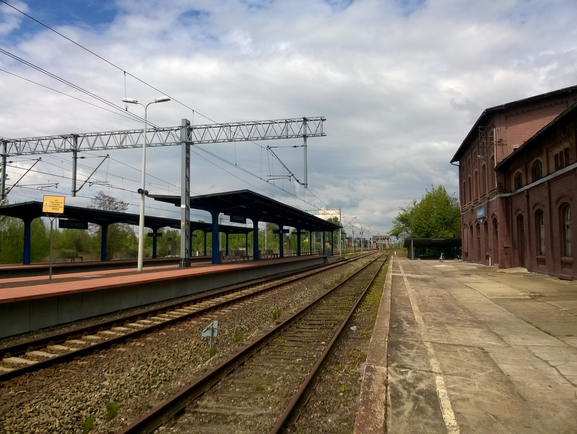 Peron 1 stacji Pyskowice